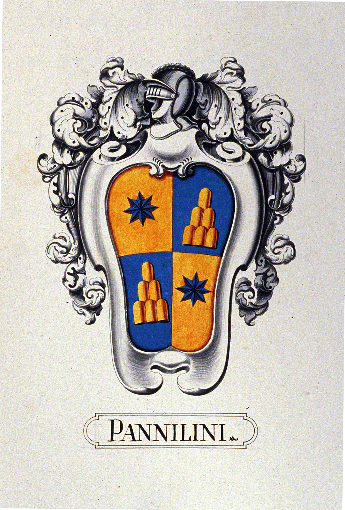 Stemma della nobile famiglia Pannilini